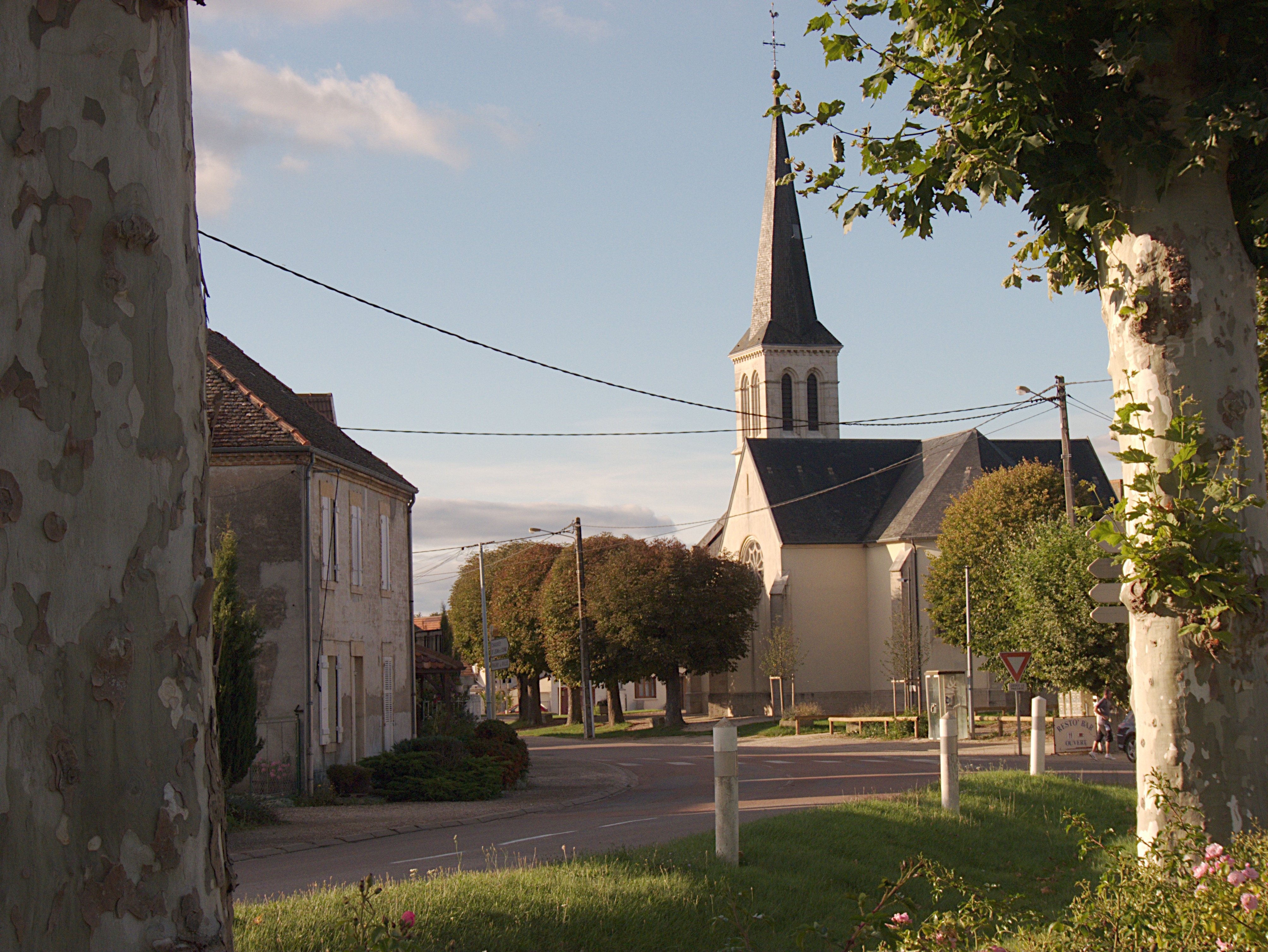 Église paroissiale Saint-Antoine, Pagny-le-Château (Côte d'Or, Bourgogne, France)